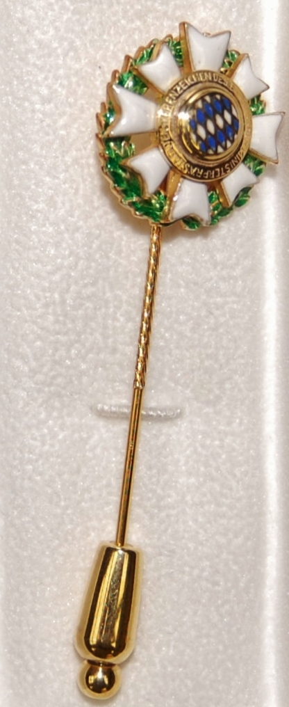 Ehrenzeichen des Bayerischen Ministerpräsidenten für Verdienste von im Ehrenamt tätigen Frauen und Männern